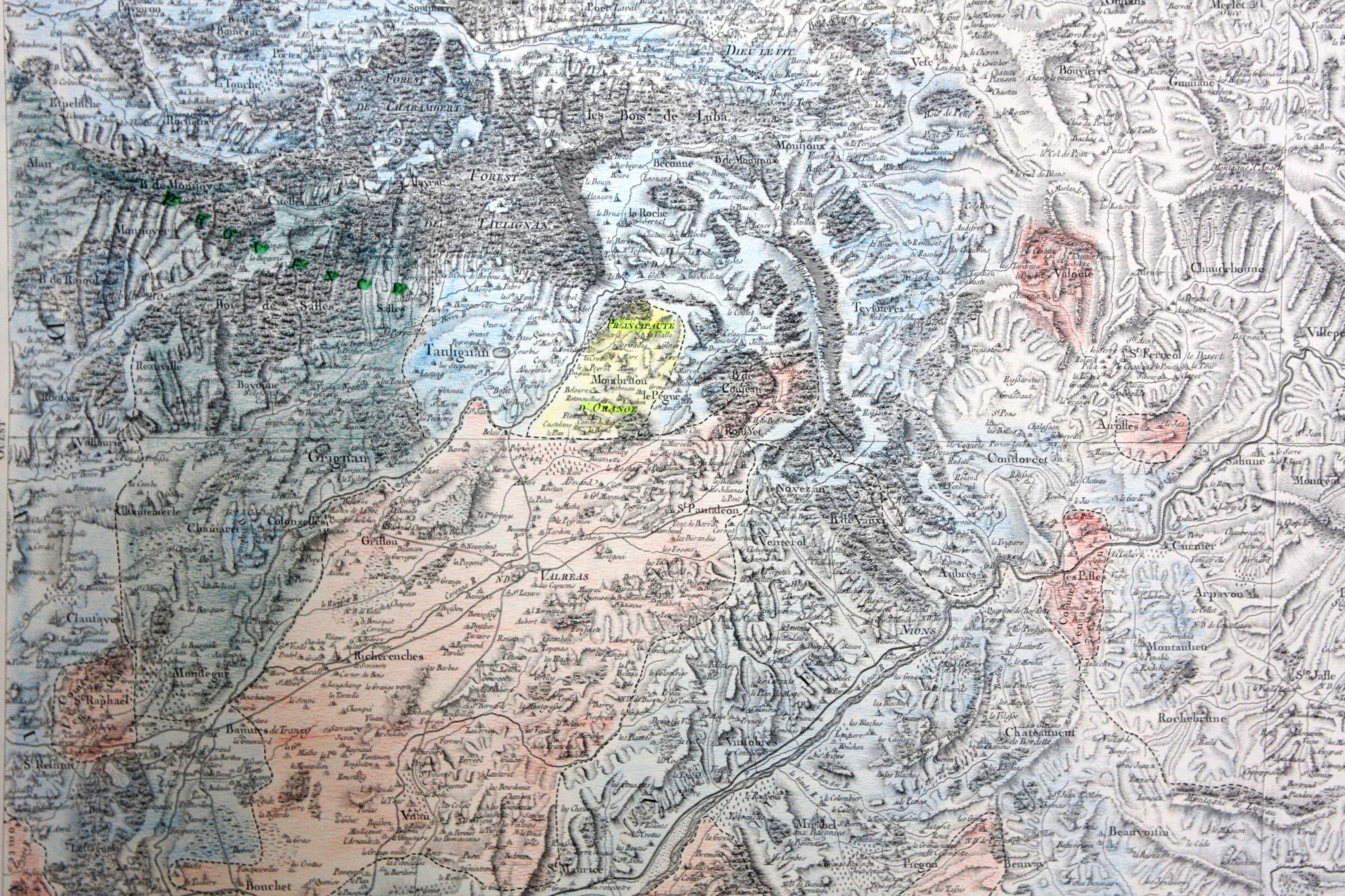 Comté de Grignan (Carte Cassini section 121, coloriée, aggrandissement) (vers 1750)